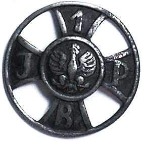 Odznaka pamiątkowa I Brygady Legionów Polskich; rewers, wykonanie z żelaza